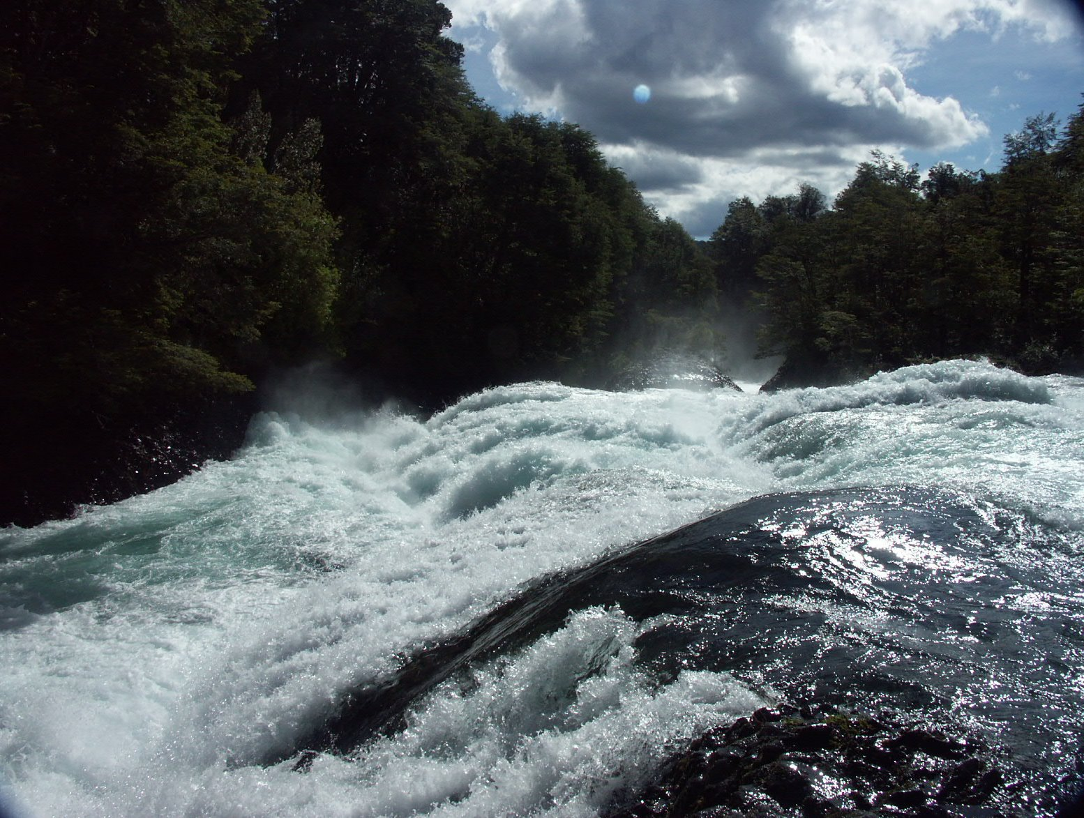 Río Fuy un km antes salto Huilo Huilo